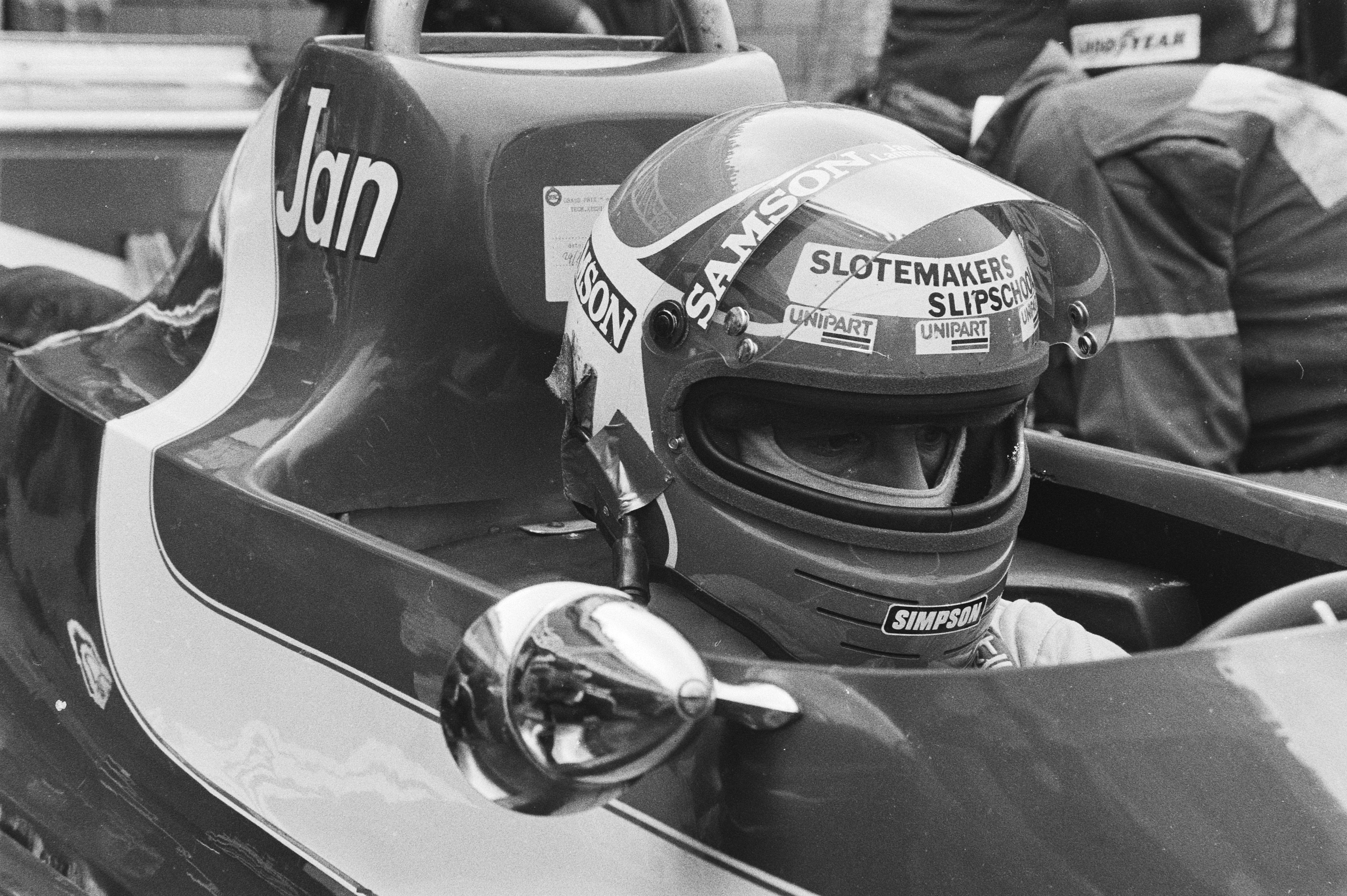 Jan Lammers met helm en brandmasker.